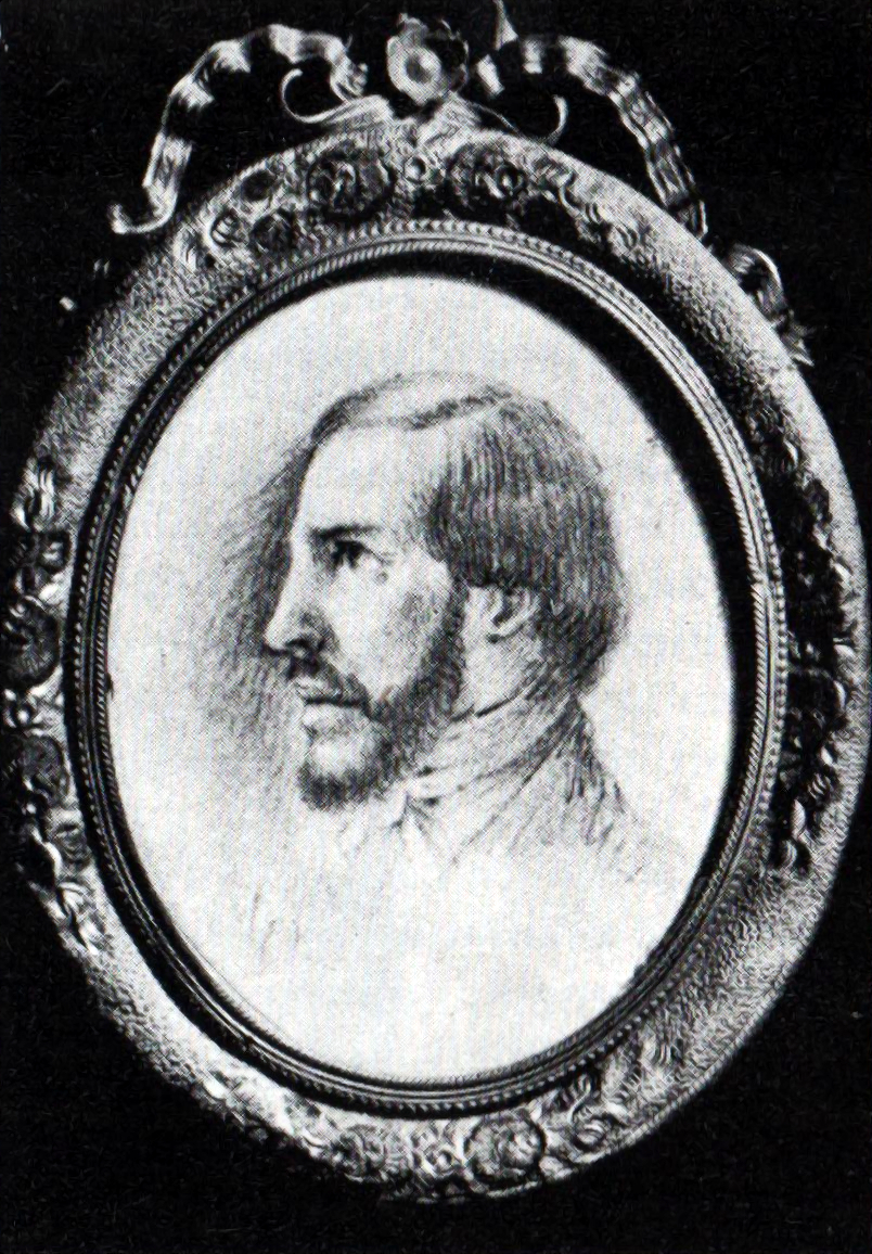 Portretul lui Nicolae Bălcescu, creion, 0,10x0,08m - Muzeul Gheorghe Tattarescu